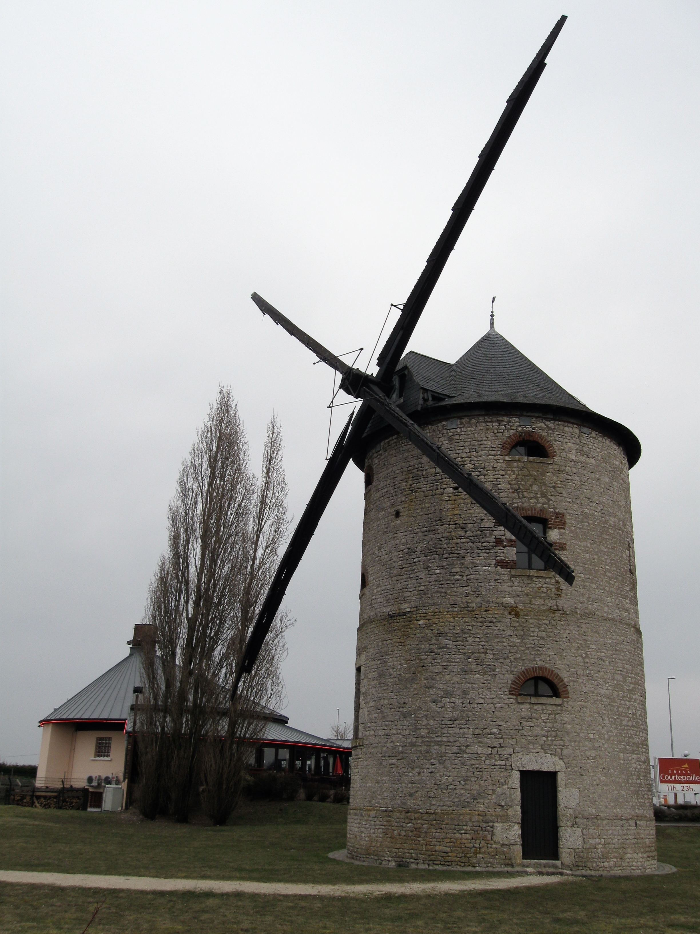 Moulin à vent des Muets, Artenay, Loiret, France